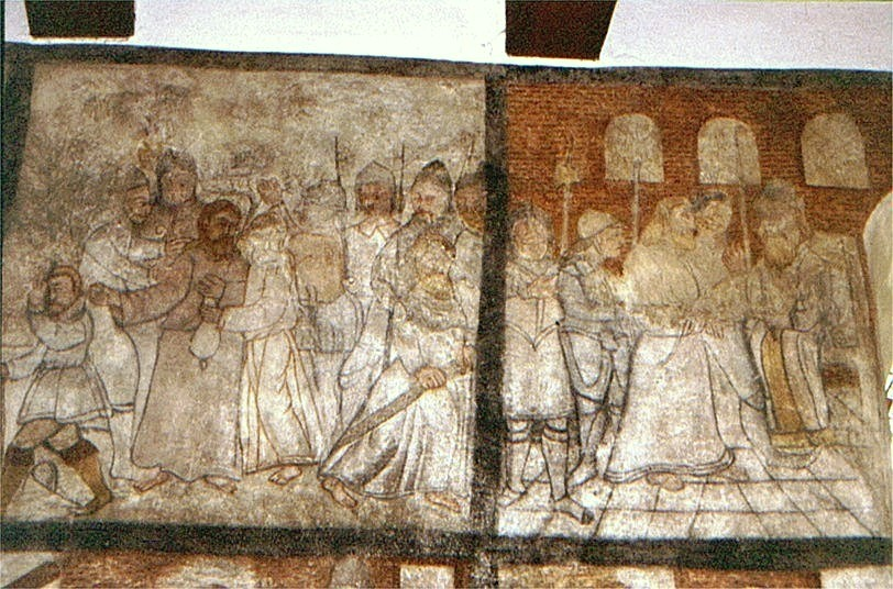 Loit Kirke i Sydslesvig. Tilfangetagelsen og Kristus for dommeren